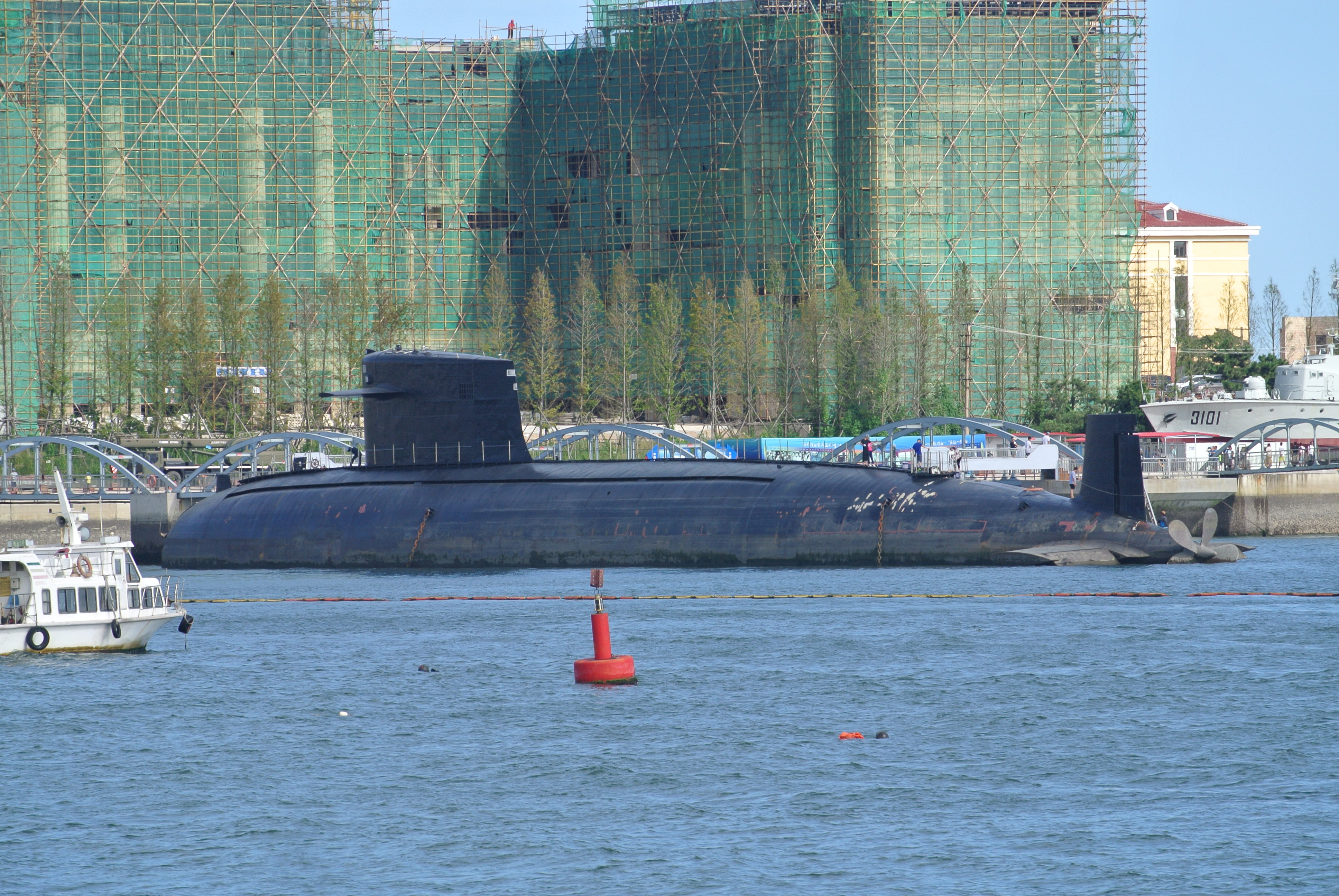 青岛中国海军博物馆长征1号核潜艇